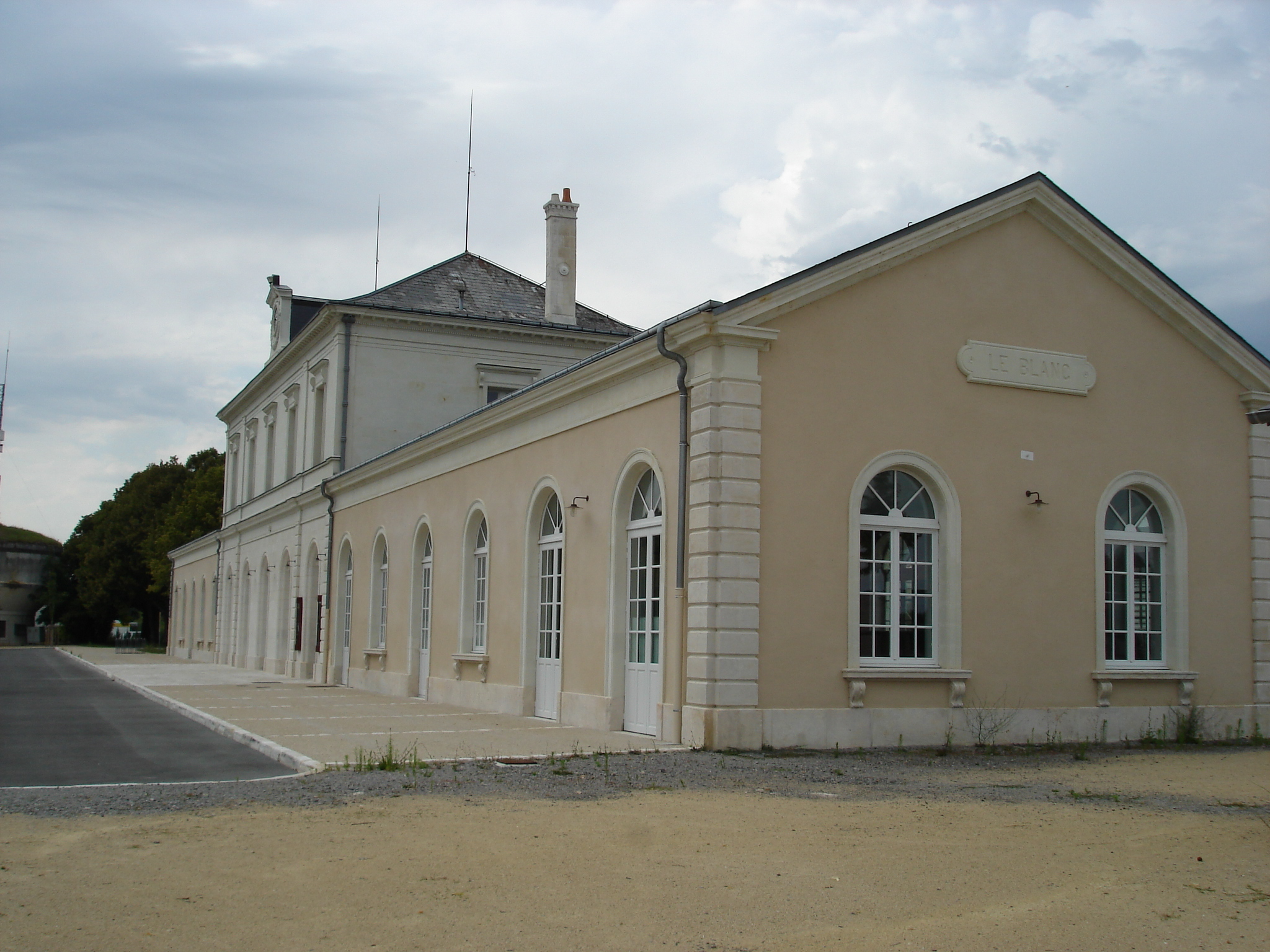 Gare du Blanc (36) : L'ancien bâtiment voyageurs.